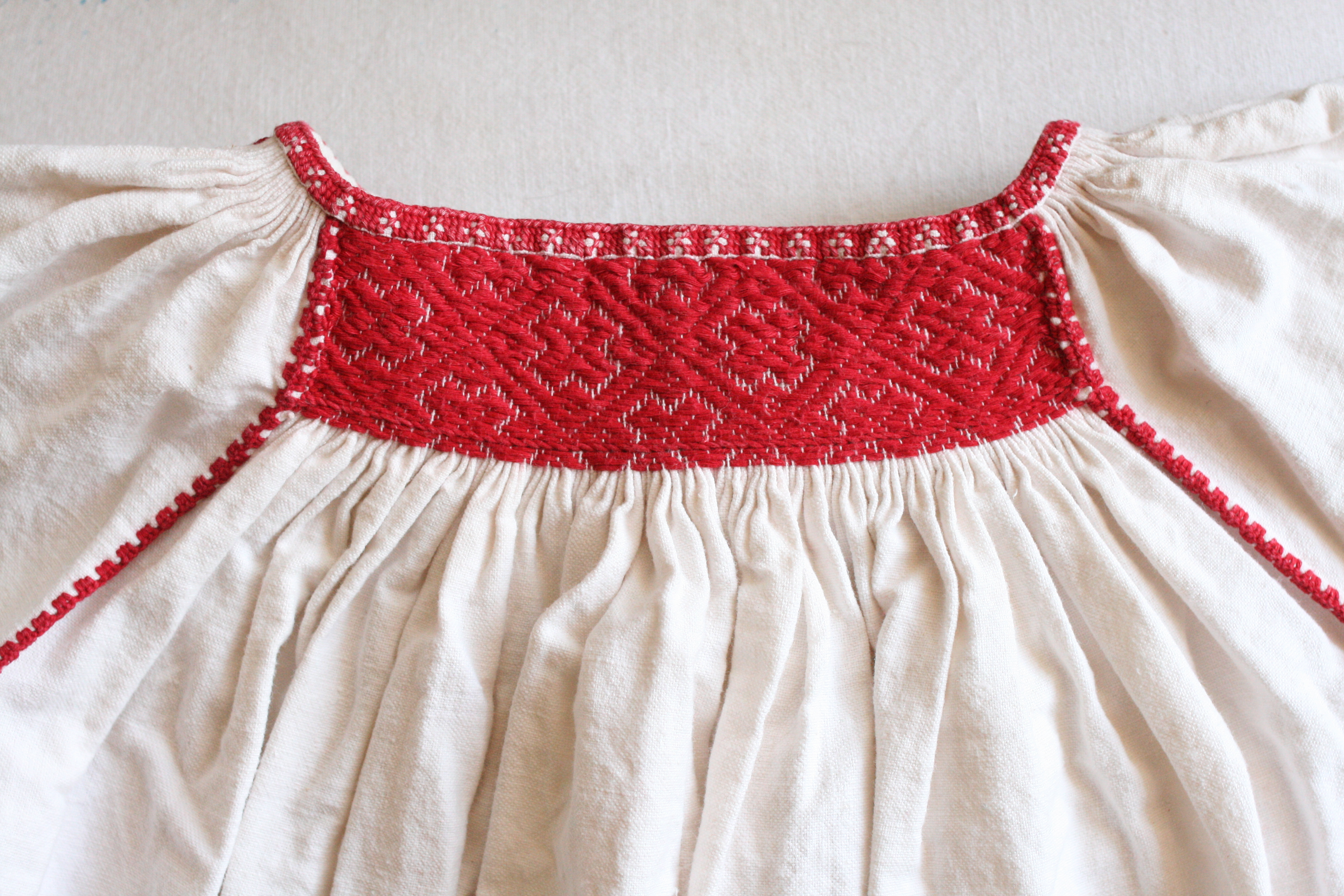 Barcasági csángó ing nyakrésze (Sepsiszentgyörgy, Erdély)